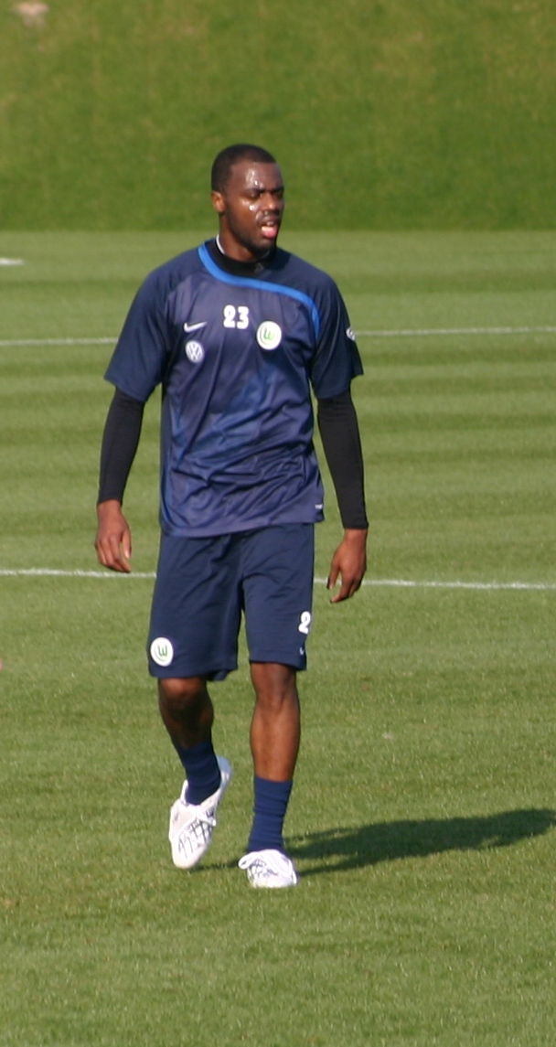 Grafite (VfL Wolfsburg) beim Training.